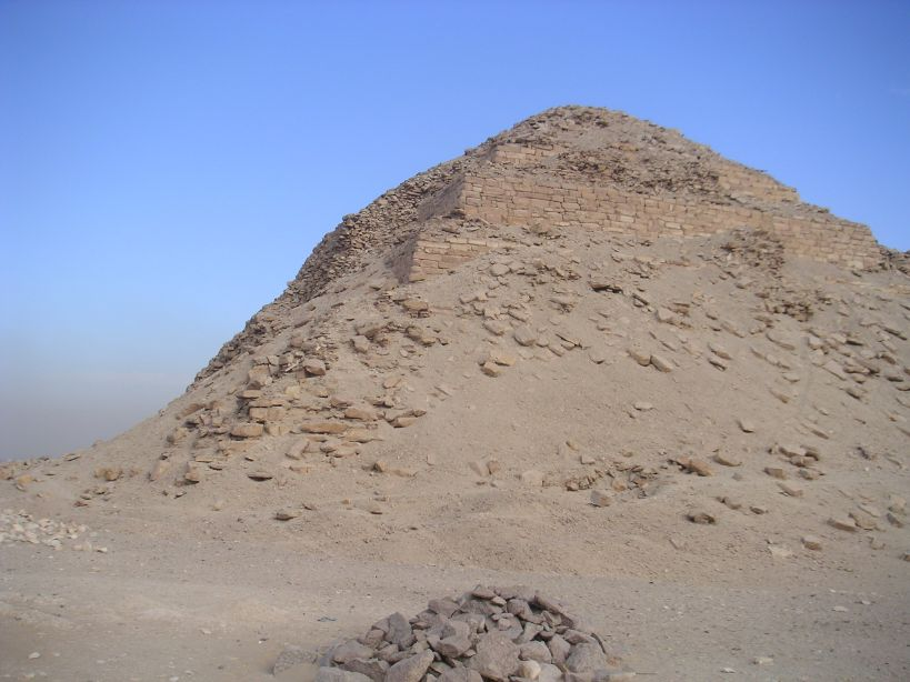 Vue de l'angle sud-ouest de la pyramide de Néferirkarê - Ve dynastie égyptienne - Abousir